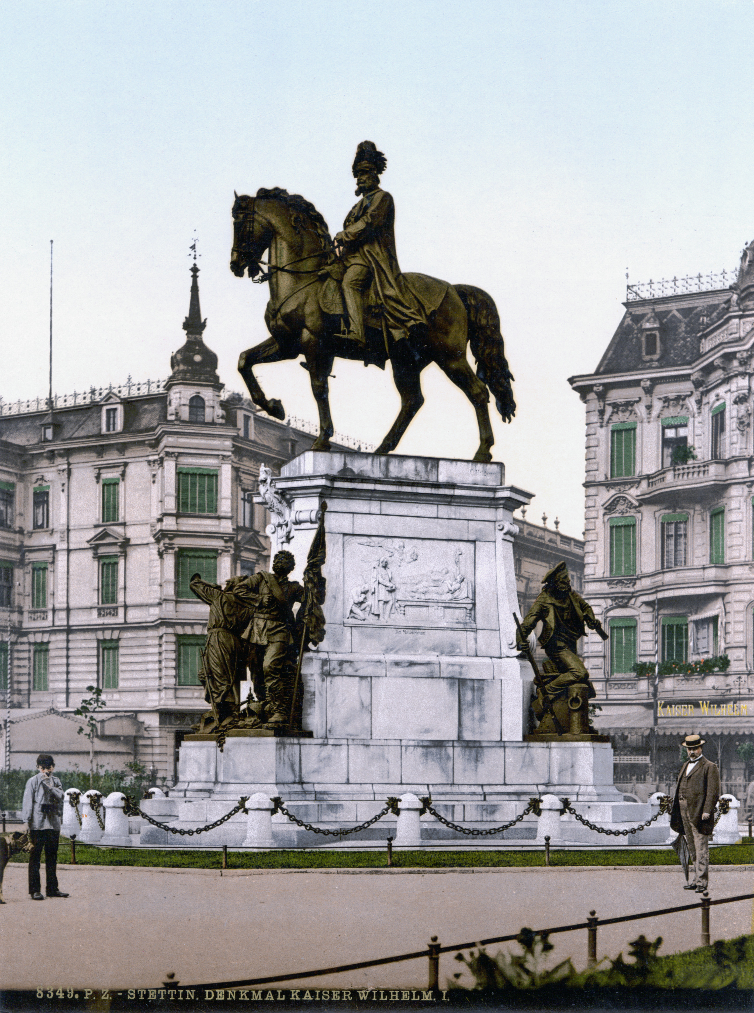 Stettin Wilhelmsdenkmal, Bildhauer Karl Hilgers (1844–1925)